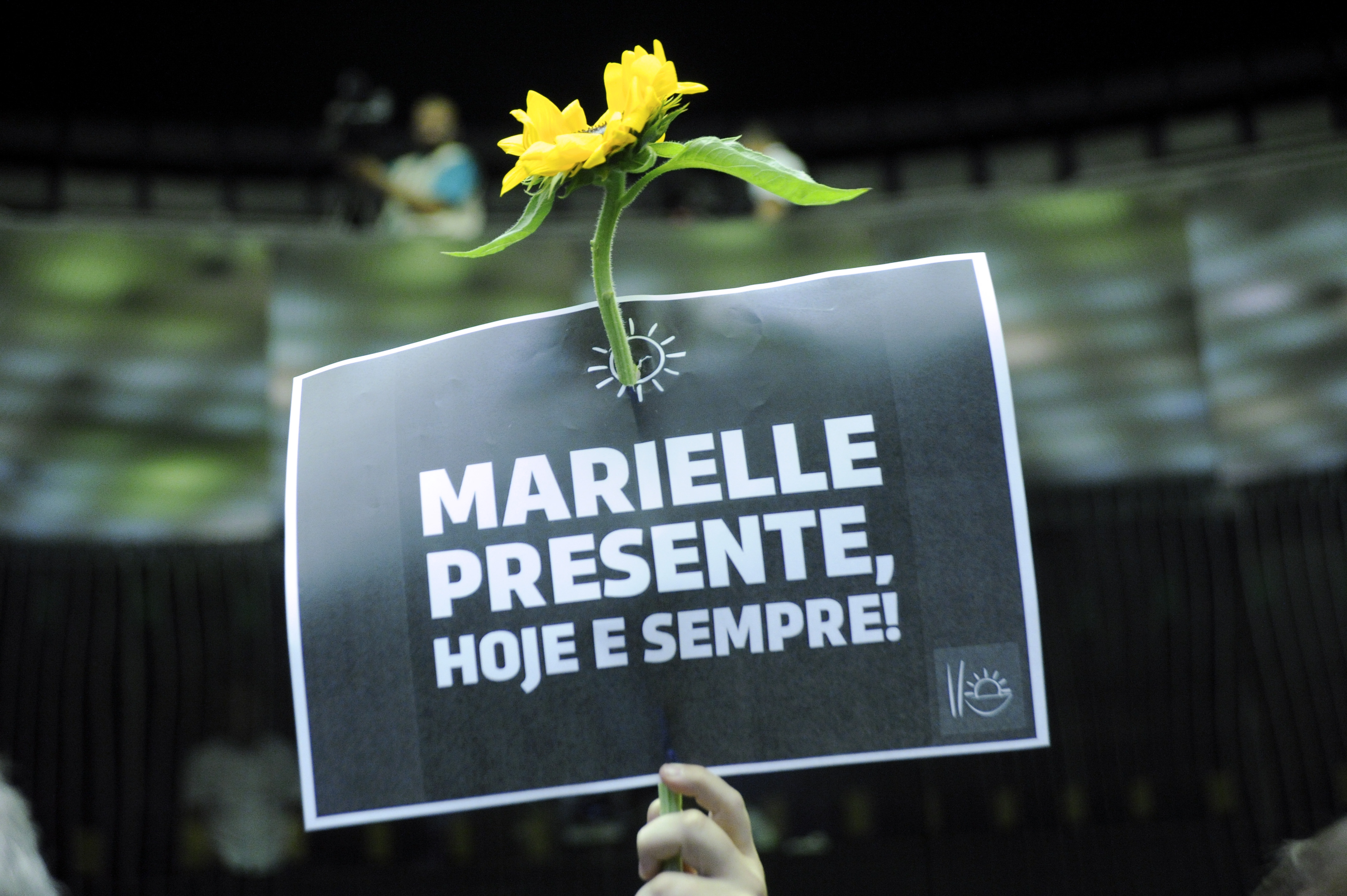 Marielle presente, hoje e sempre!.